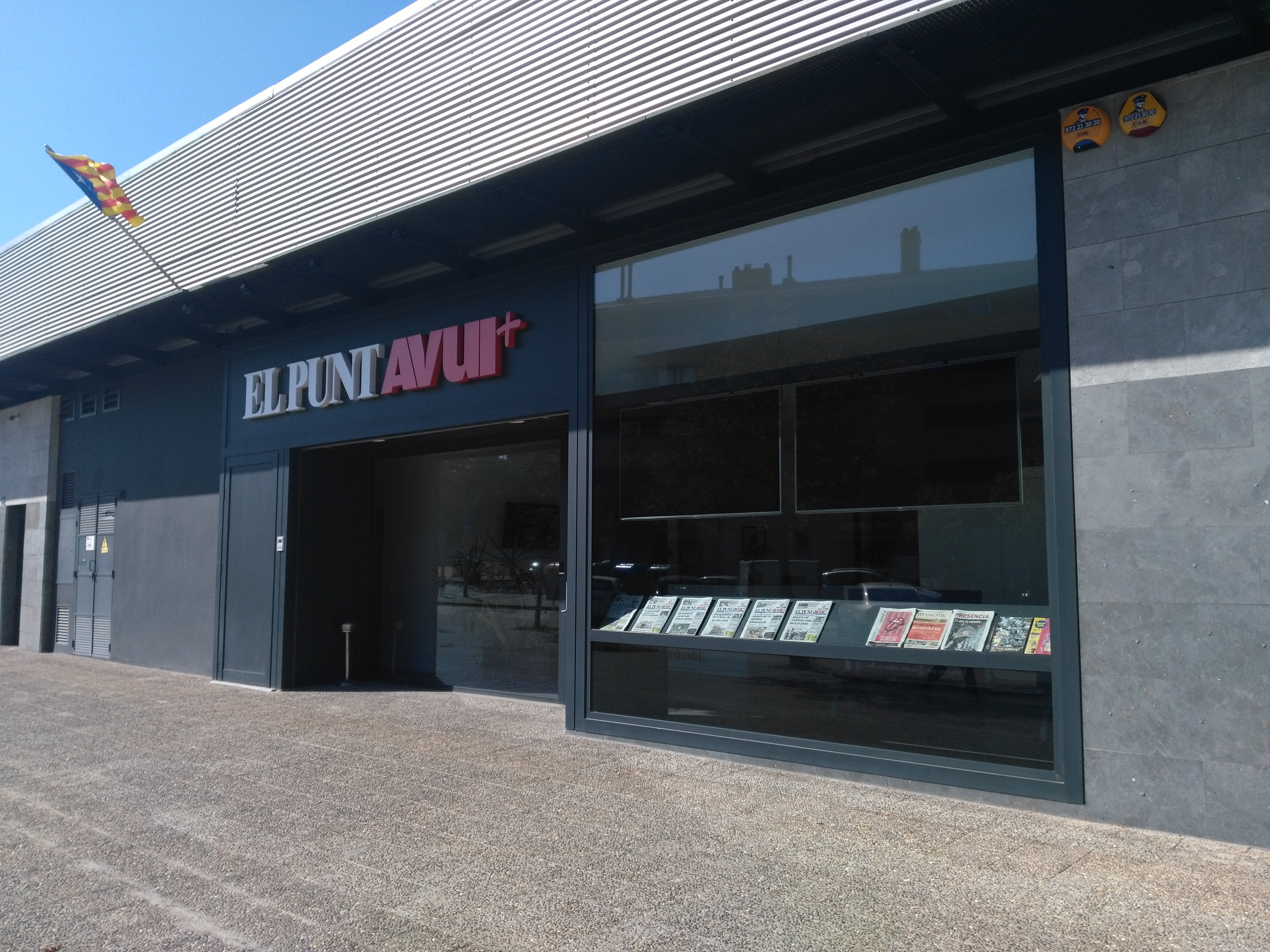 Redacció d'El Punt Avui a Girona l'any 2017.